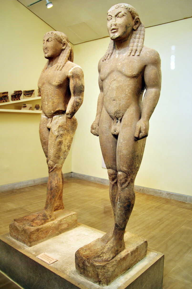 Museum Delphi, Sphinx